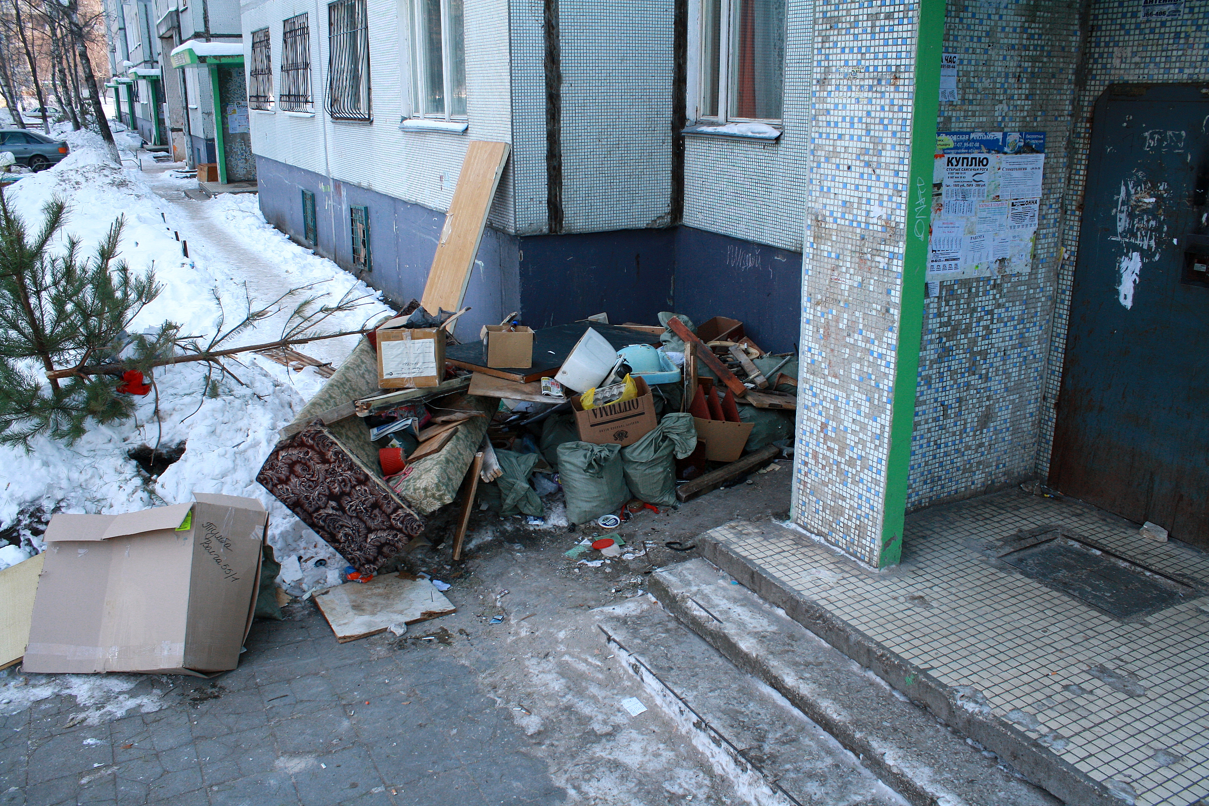 Мусор сваленный у подъезда дома. г. Тольятти.